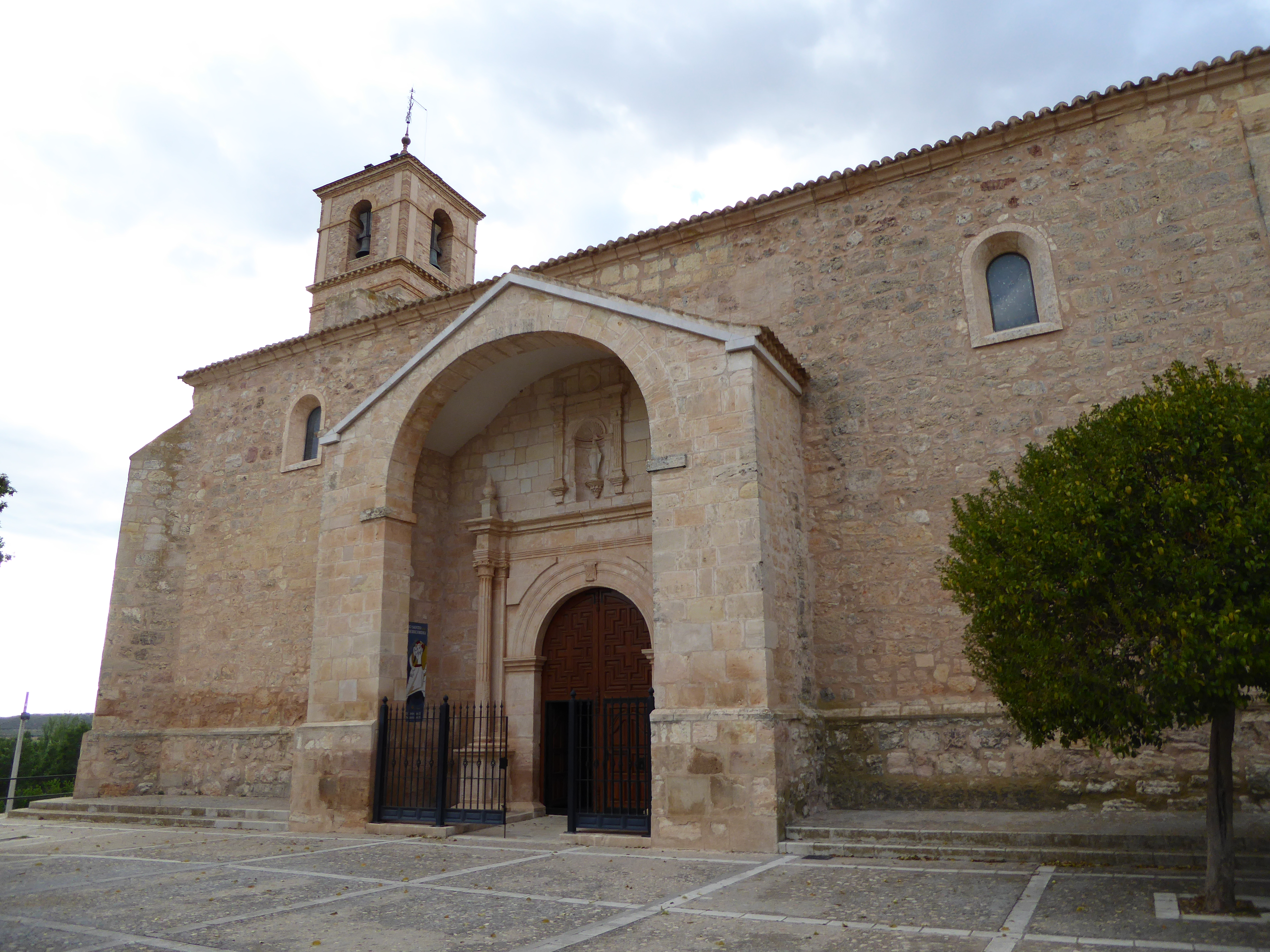 Osa de la Vega